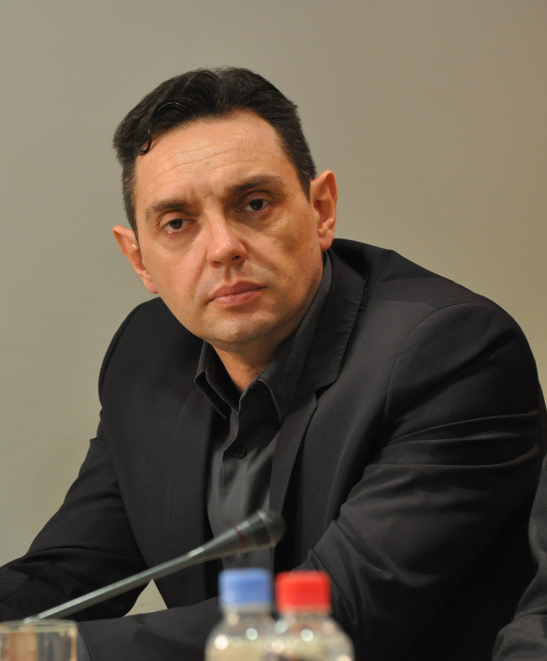 Александар Вулин 2015